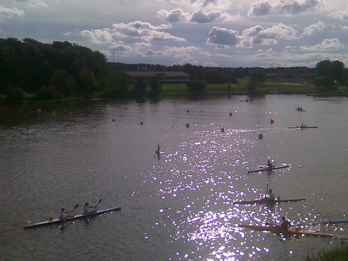 Vandkraftsøen Holstebro, DM kano/kajak 2008